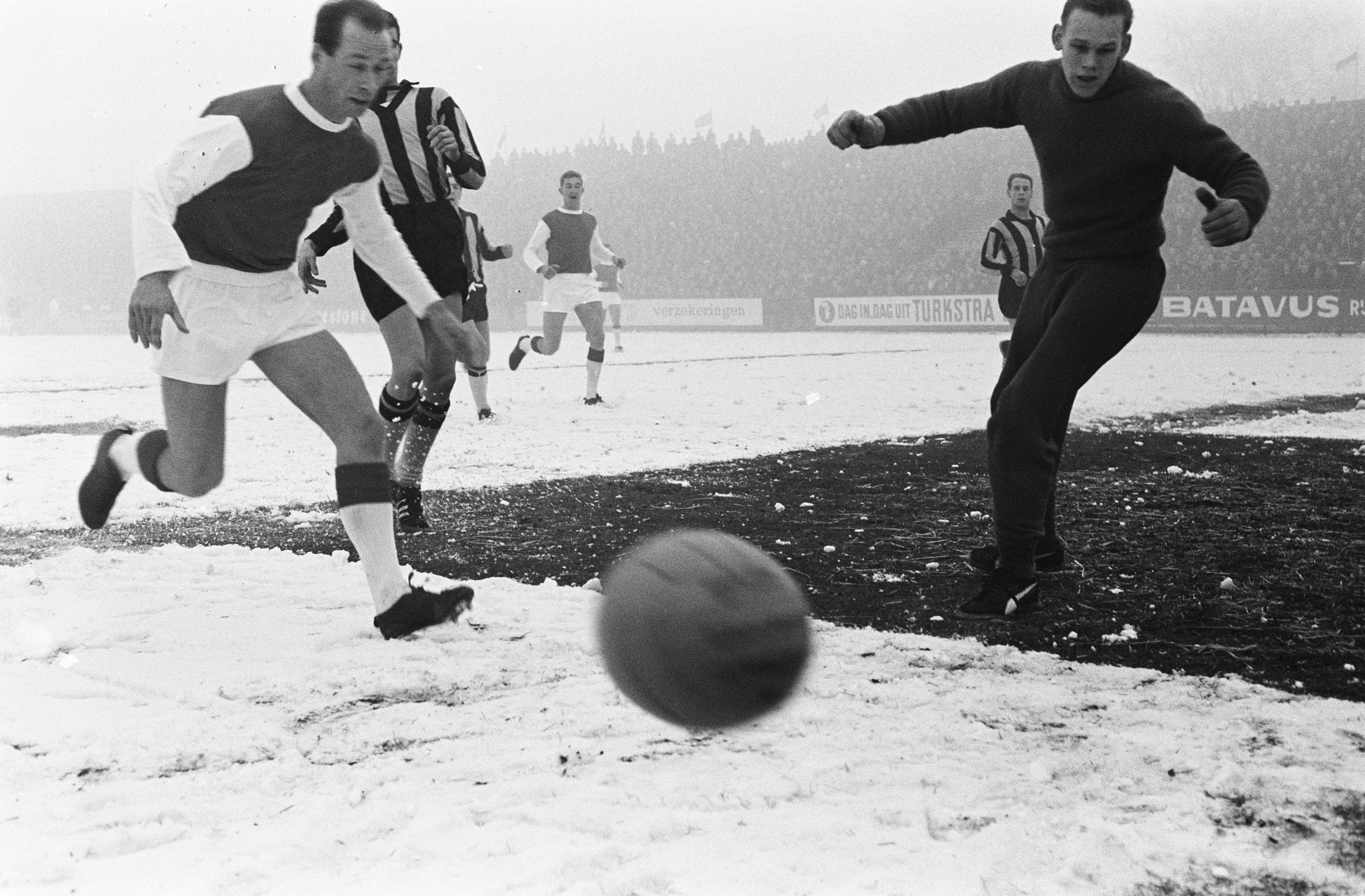 Collectie / Archief : Fotocollectie Anefo Reportage / Serie : [ onbekend ] Beschrijving : Ajax tegen NAC 2-2. Ajaxaanval Vesters, Cees de Groot en keeper van der Merwe (NAC) Datum : 22 december 1963 Trefwoorden : sport, voetbal Fotograaf : Pot, Harry / Anefo Auteursrechthebbende : Nationaal Archief Materiaalsoort : Negatief (zwart/wit) Nummer archiefinventaris : bekijk toegang 2.24.01.05 Bestanddeelnummer : 915-8729